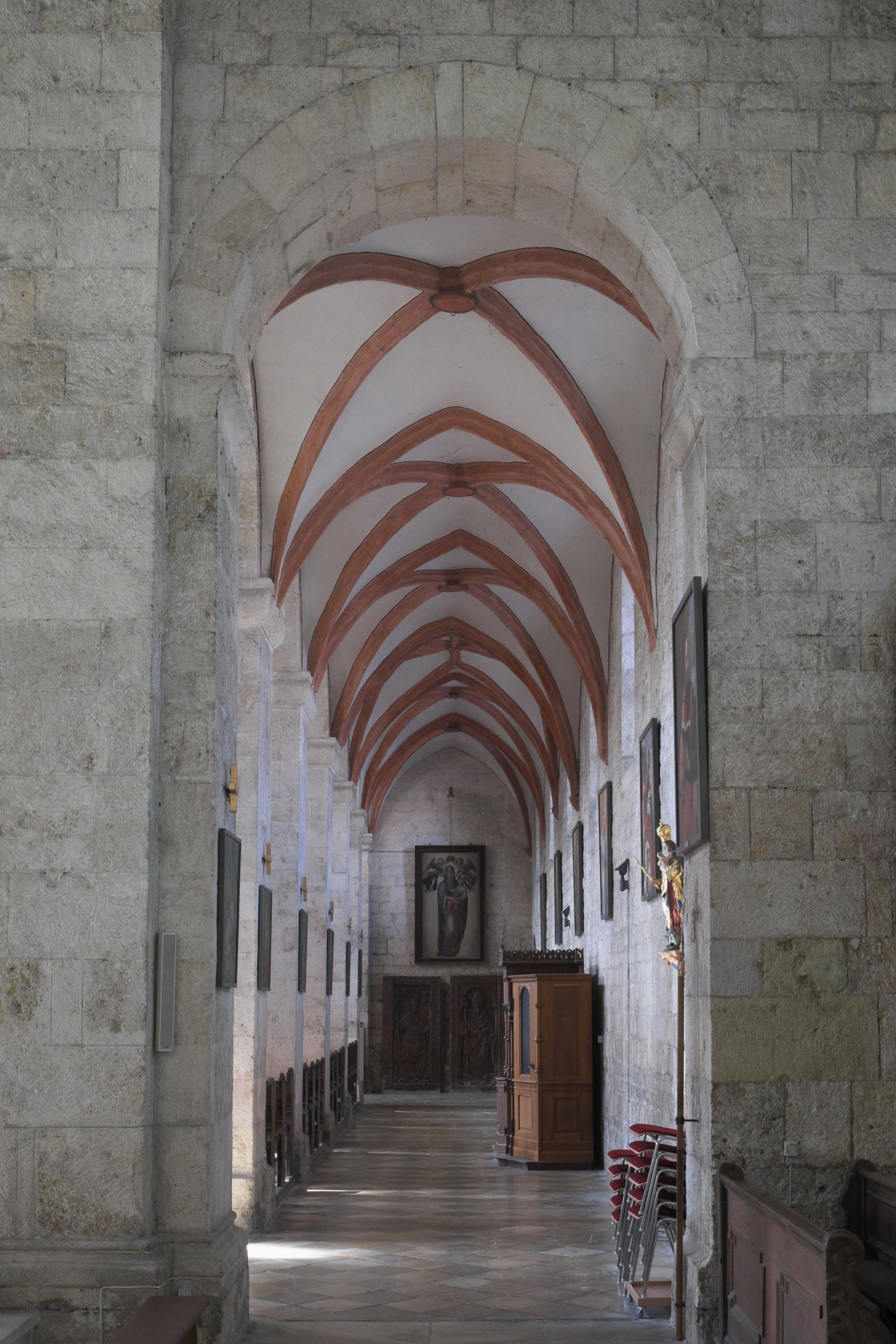 Katholische Pfarrkirche Maria Immaculata in Biburg im niederbayerischen Landkreis Kelheim (Bayern/Deutschland), nördliches Seitenschiff